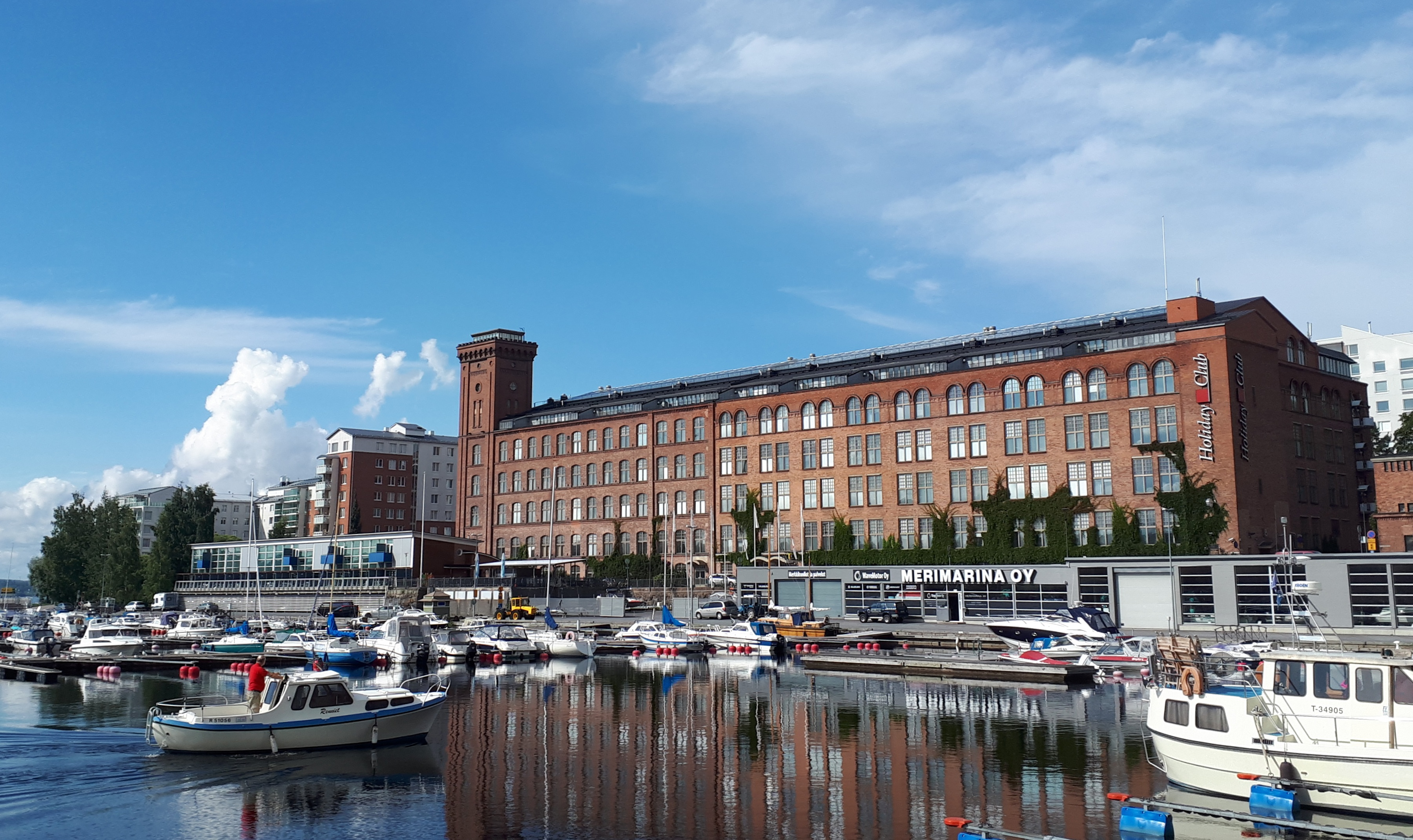 Holiday Club Tampereen kylpylä Lapinniemessä Naistenlahden rannalla.